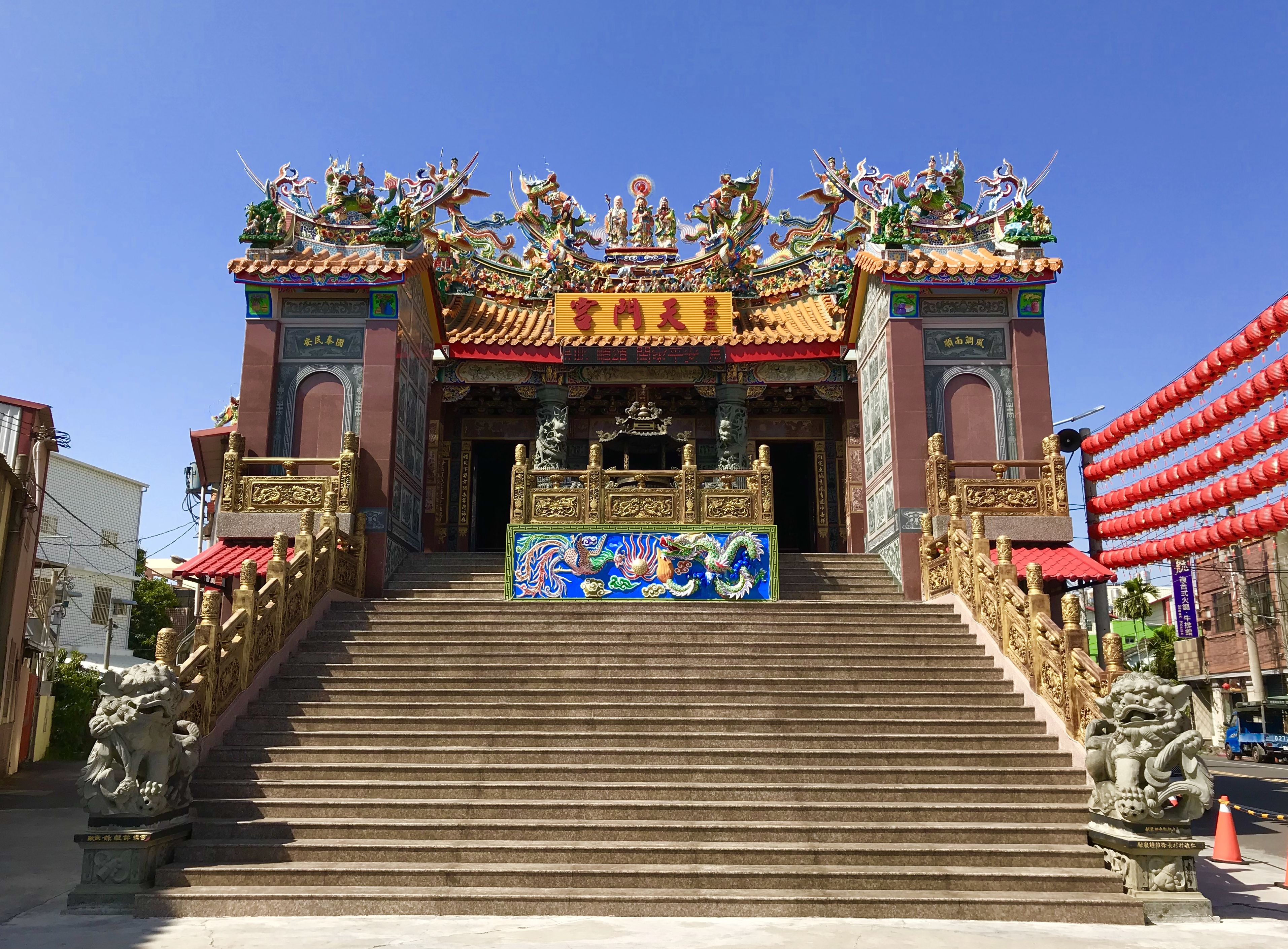 中文（台灣）: 崙仔庄天門宮正面照